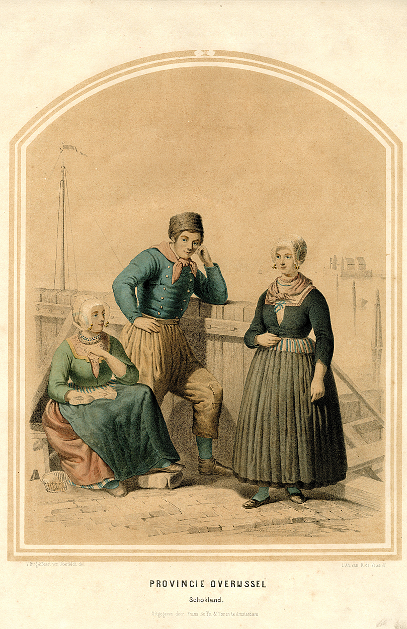 Man en vrouwen in Schokker klederdracht, een ingekleurde litho van R. de Vries jr. uit ca. 1850.